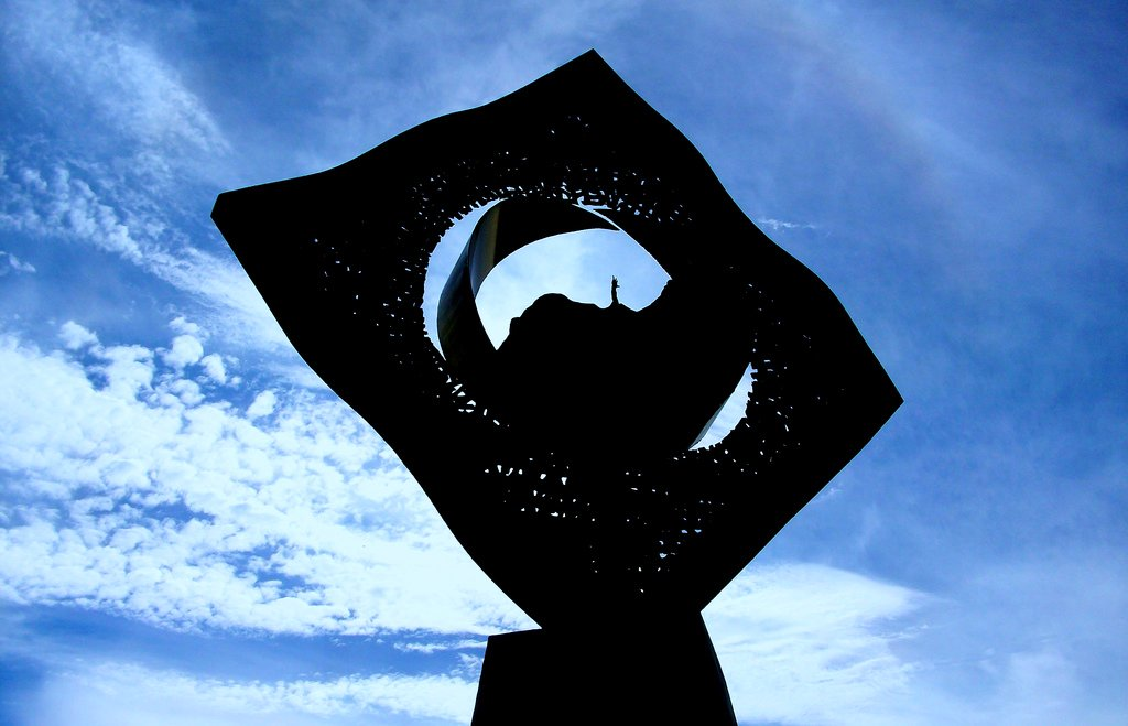 Una de las obras más importantes e identifcativas de la Universidad de Los Andes en Mérida Venezuela.